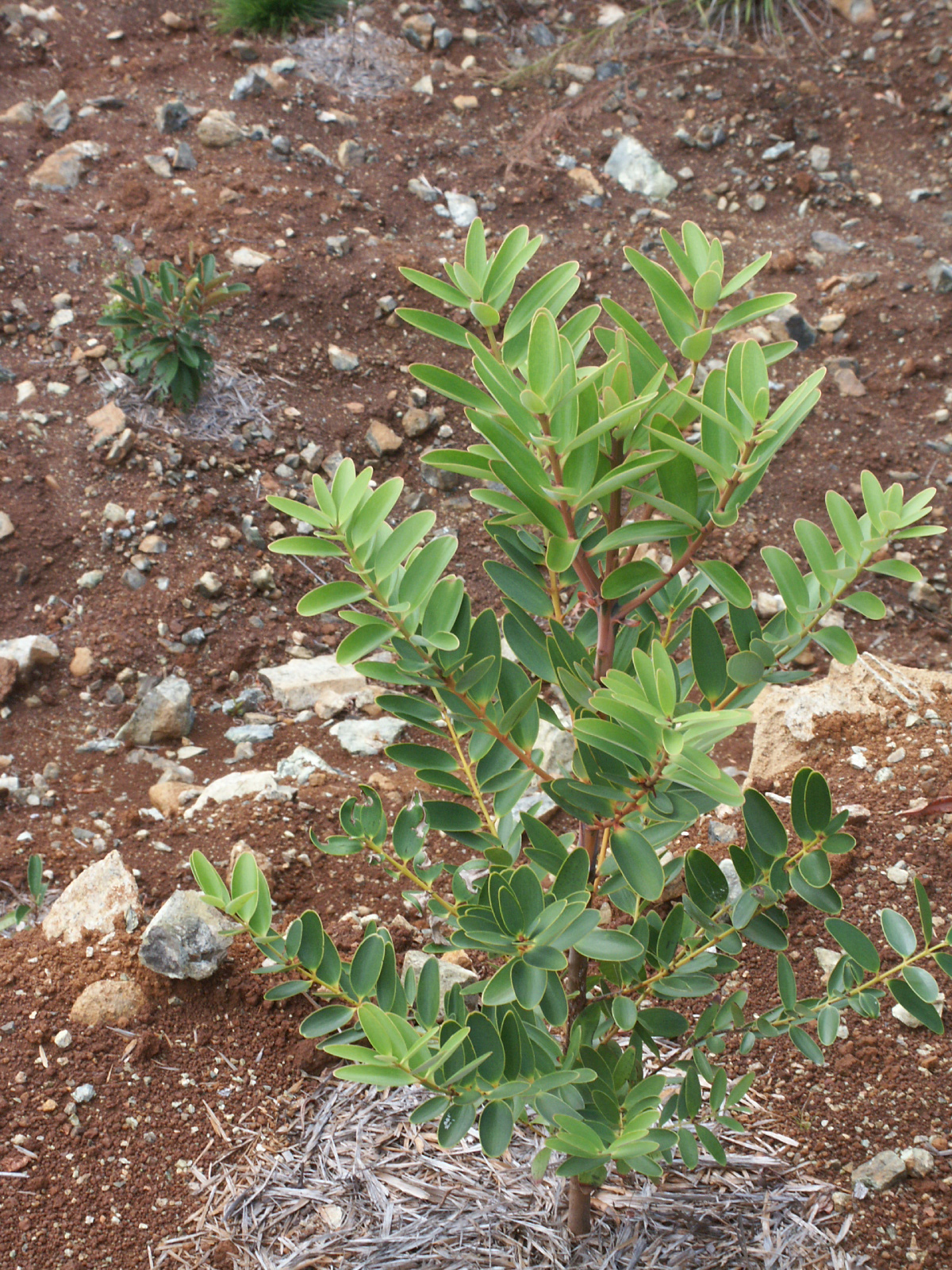 Jeune plant d'Agathis ovata en réhabilitation de terrains miniers. 2ème phase d'extension de la réhabilitation de la mine de Rouvray - Commune de Montdore - Nouvelle-Calédonie - France